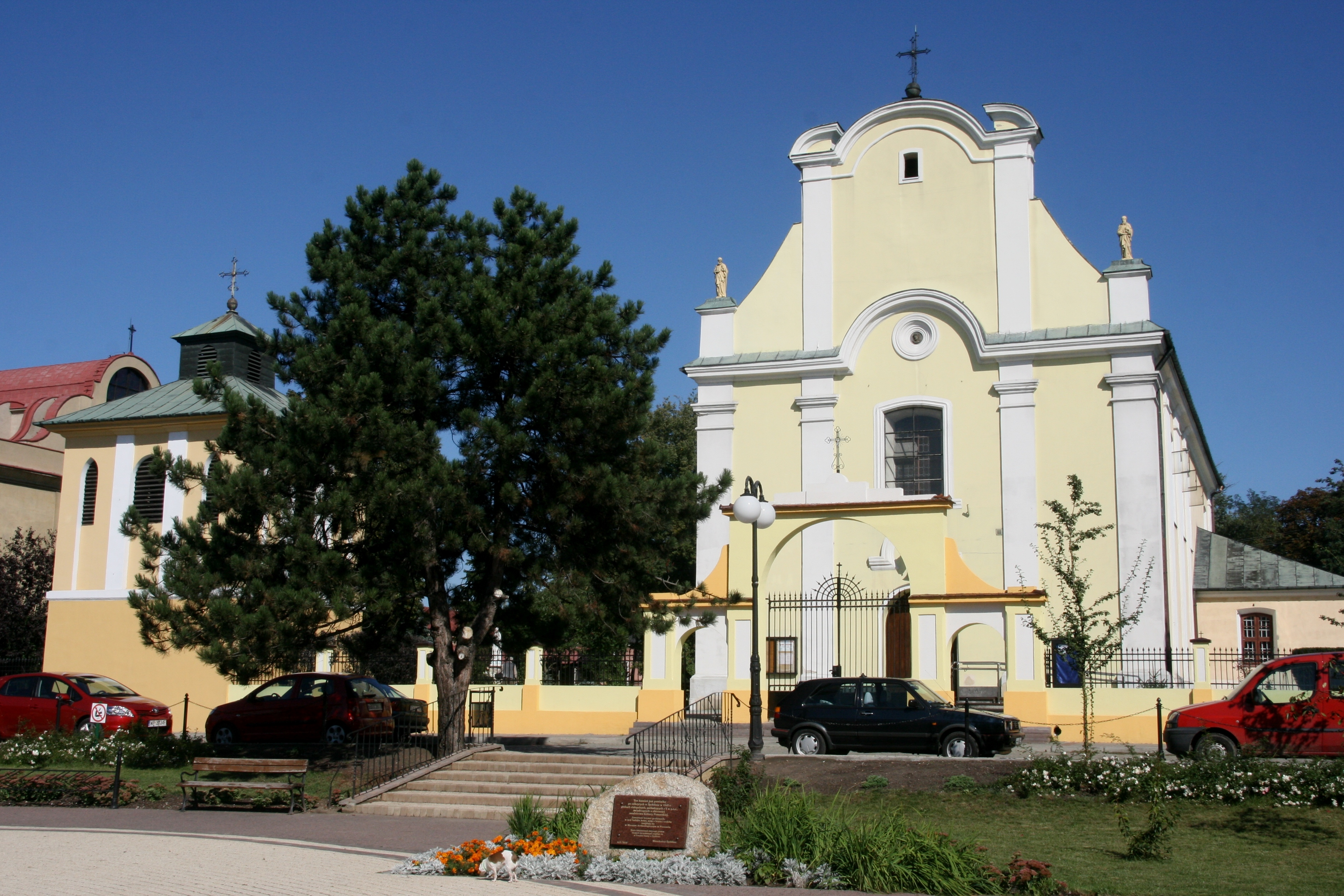 Żychlin - kościół parafialny pw. śś. Piotra i Pawła, mur., 1782 (zabytek nr 270/29 z 18.07.1967)